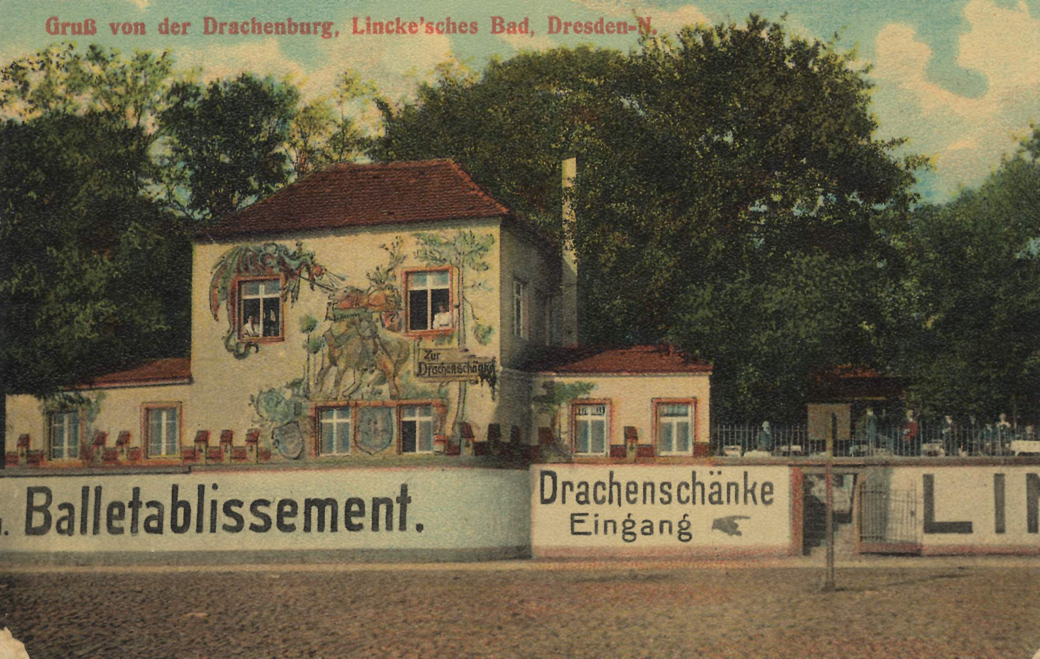 Postkarte Drachenburg, Linckesches Bad